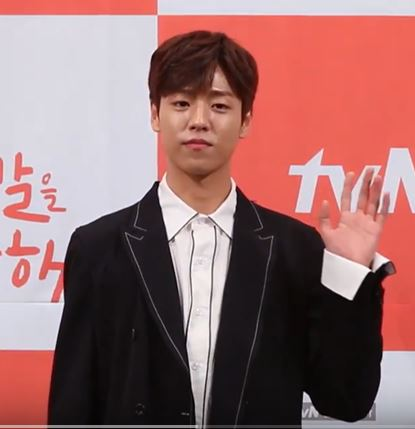 [TV10] 3월 14일 tvN '그녀는 거짓말을 너무 사랑해' 제작발표회 현장